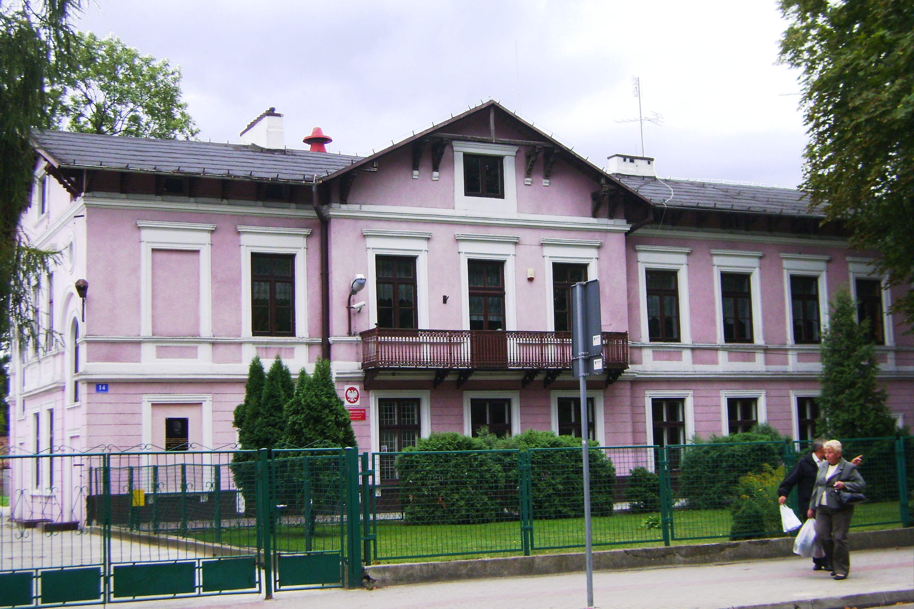 Dom, mur., ok. 1880 Skierniewice, ul. Sienkiewicza 14, Skierniewice 01.1985.